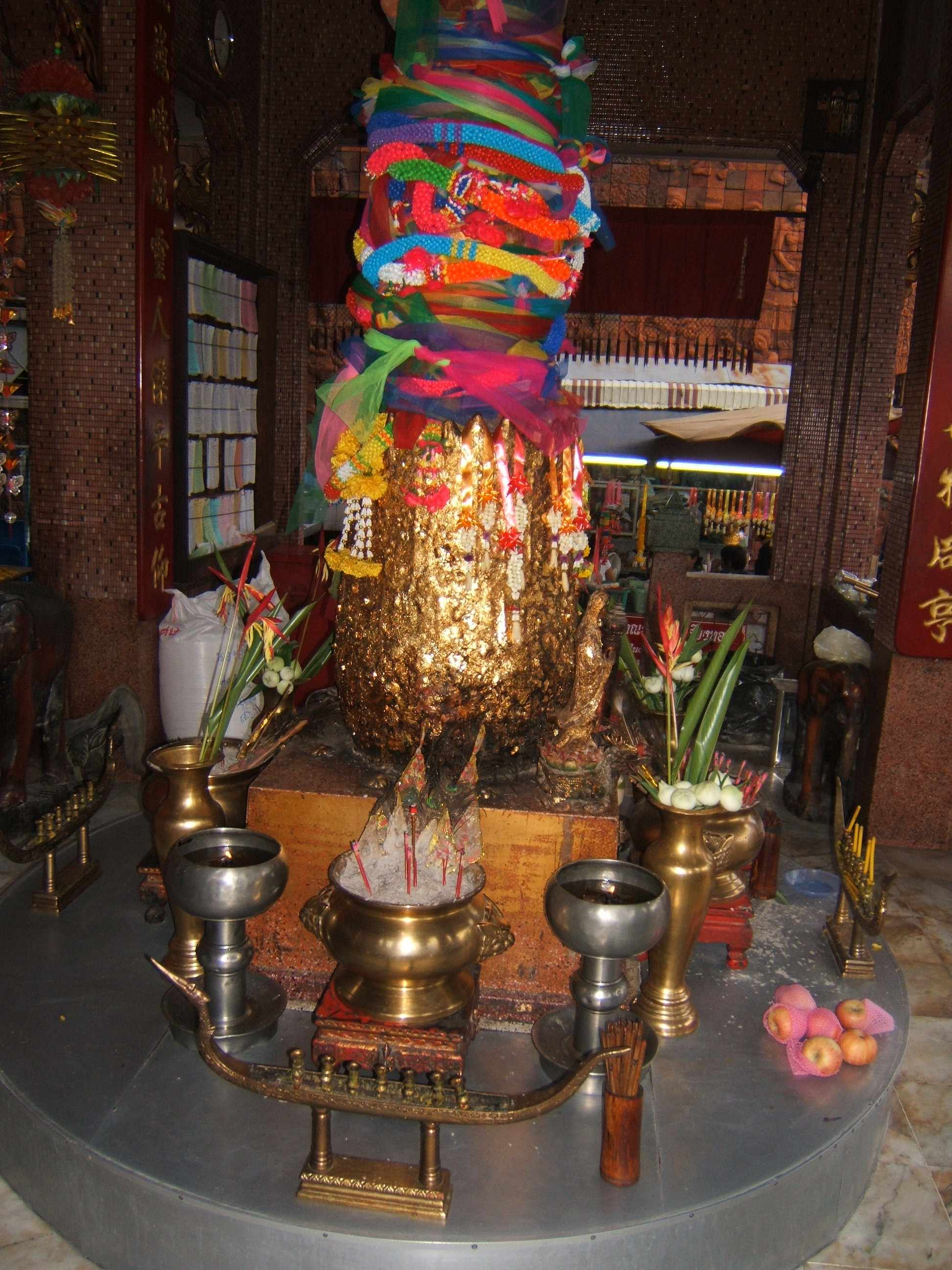 Sao Lak Mueang in Nakhon Ratchasima, Thailand